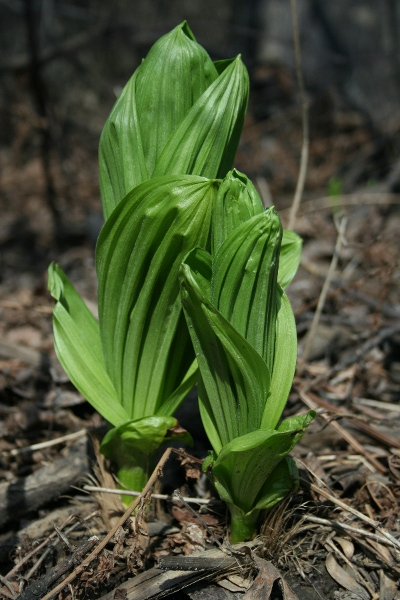 Jeune pousse de Veratrum viride au printemps. Photo prise à Québec, sur les rives de la rivière St-Charles